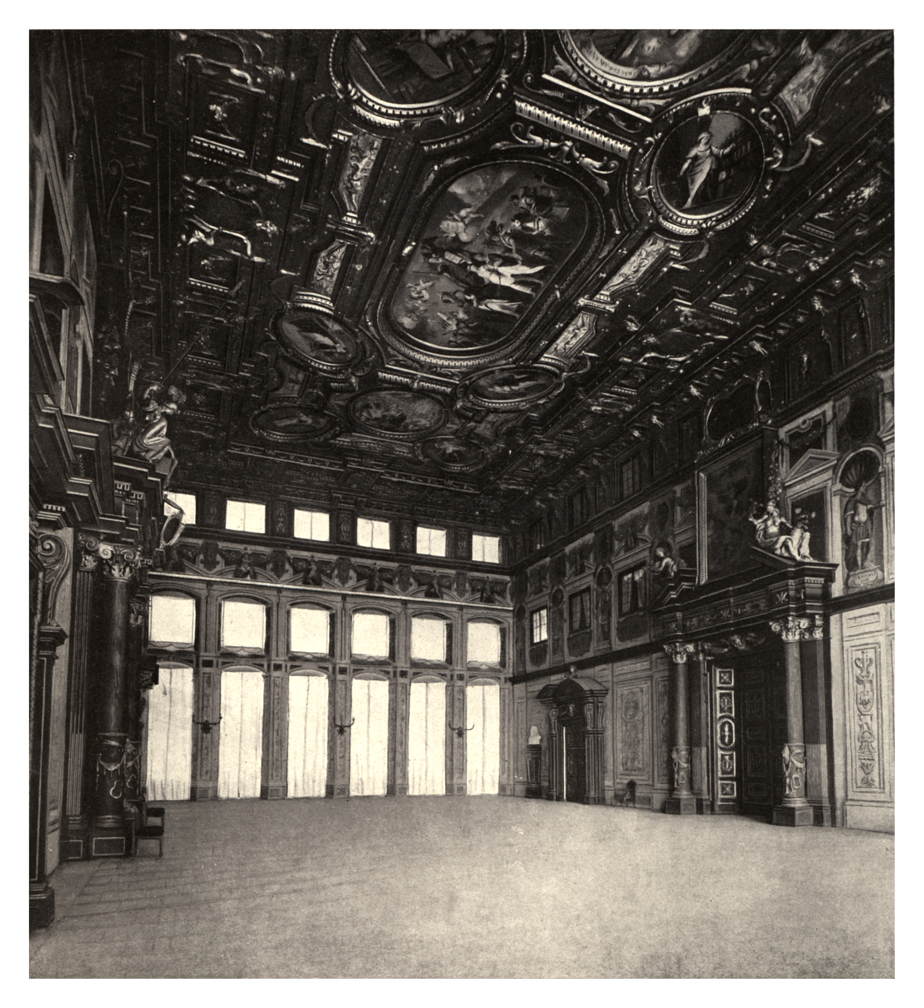 Baer, C. H. - Deutsche Wohn- und Festräume aus sechs Jahrhunderten Band 6 Verlag von Julius Hoffmann, Stuttgart 1912